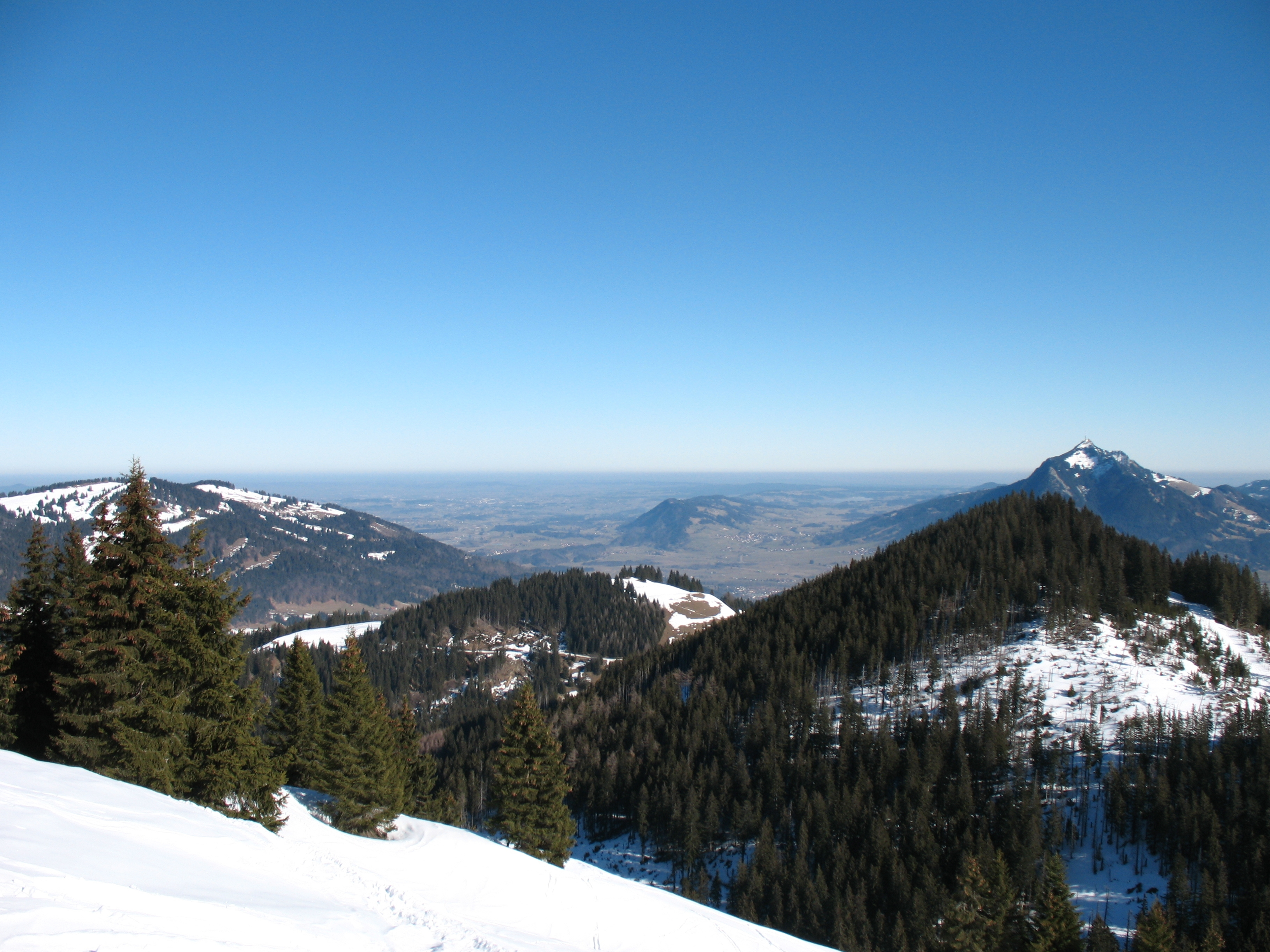 Blick vom Rangiswanger Horn auf das Sigiswanger Horn (1527 m) und das Ofterschwanger Horn (1406 m).